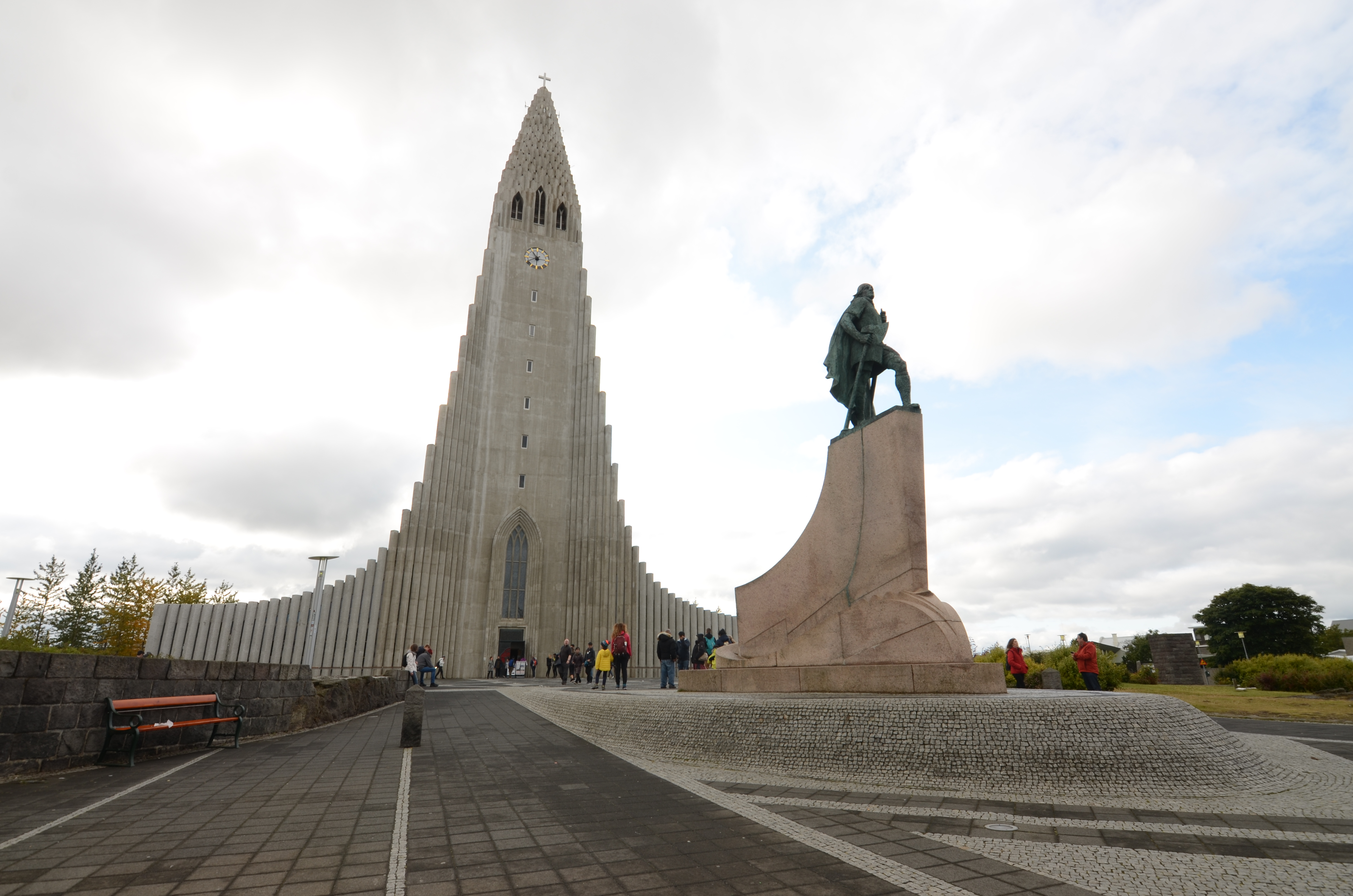 De Hallgrímskirkja en een standbeeld van Leifur Eiríksson in Reykjavik.